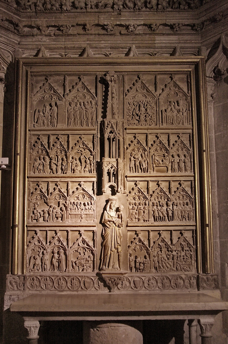 Retaule en alabastre de l'any 1368 realitzat pel mestre Aloi de Montbrai. Ubicat a la Capella de Santa Maria dels Sastres dins de la Catedral de Tarragona (Catalunya).